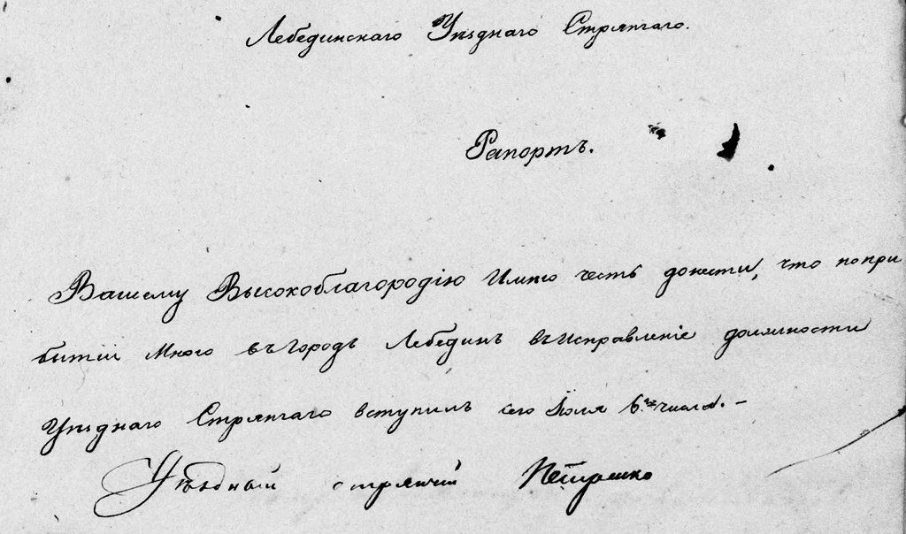 рапорт Михайла Петренка про початок служби в Лебедині